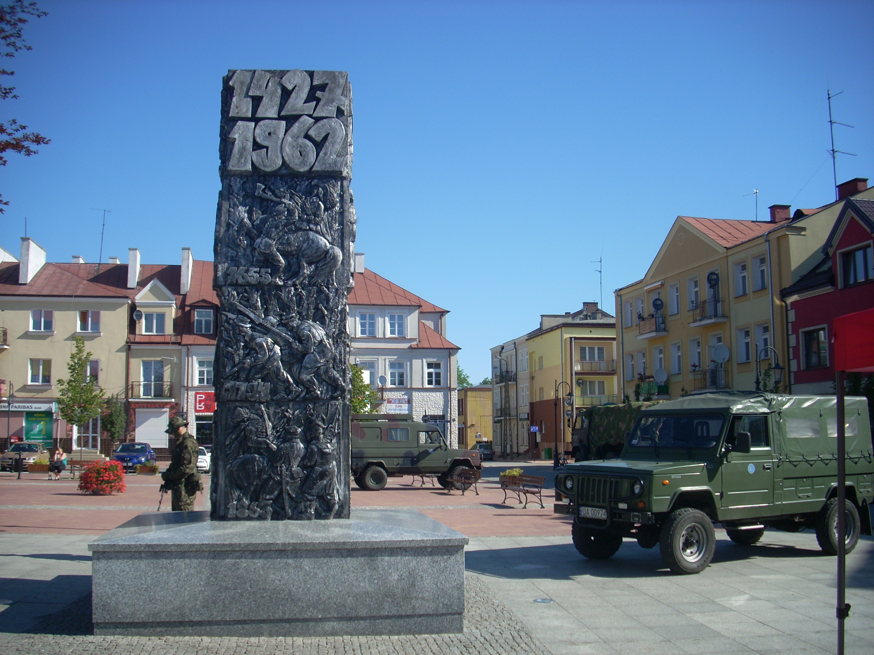 Pomnik upamiętniający uzyskanie przez Przasnysz rozszerzonych praw miejskich